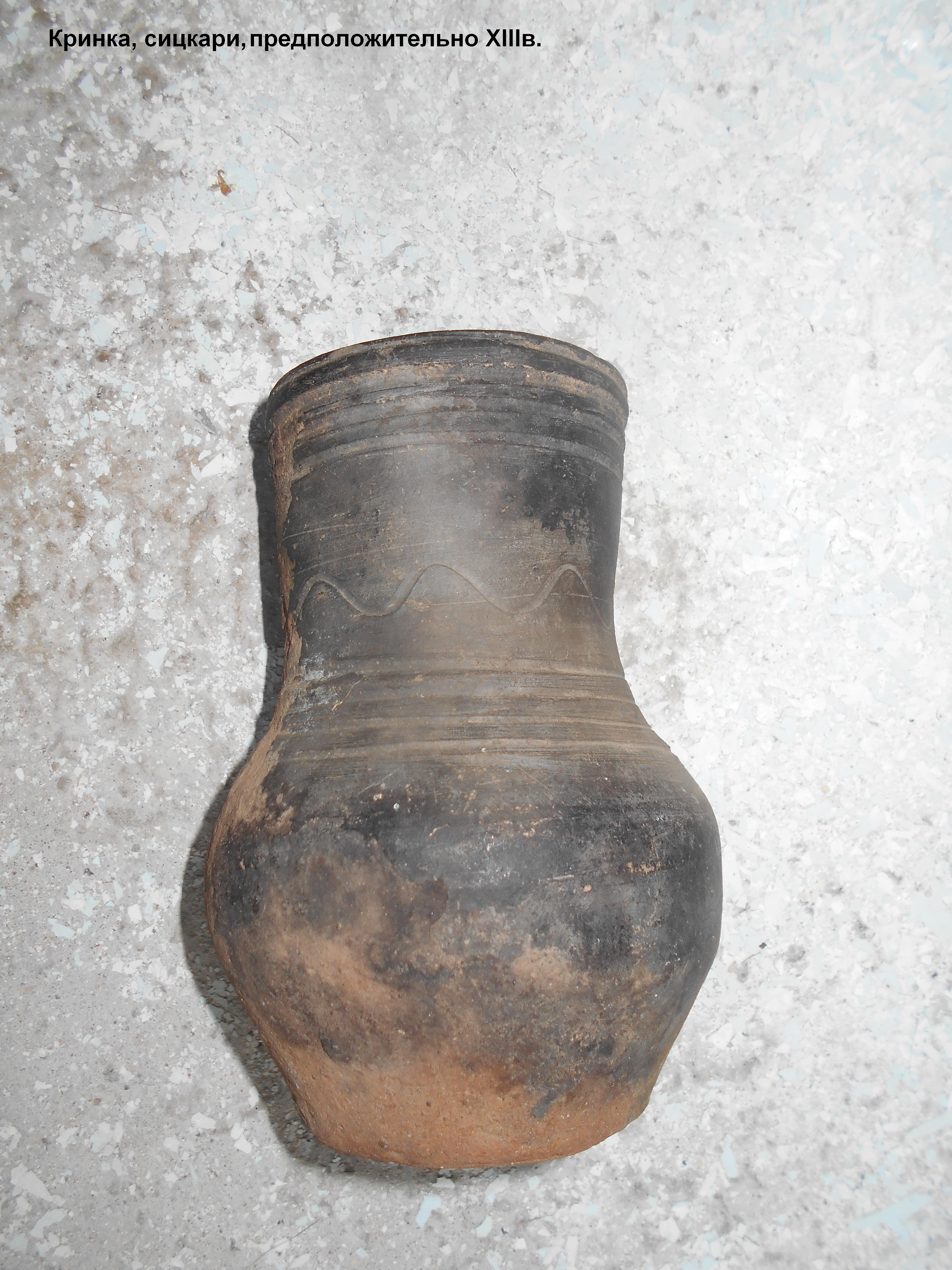 Кринка, сицкари, предположительно 13 век